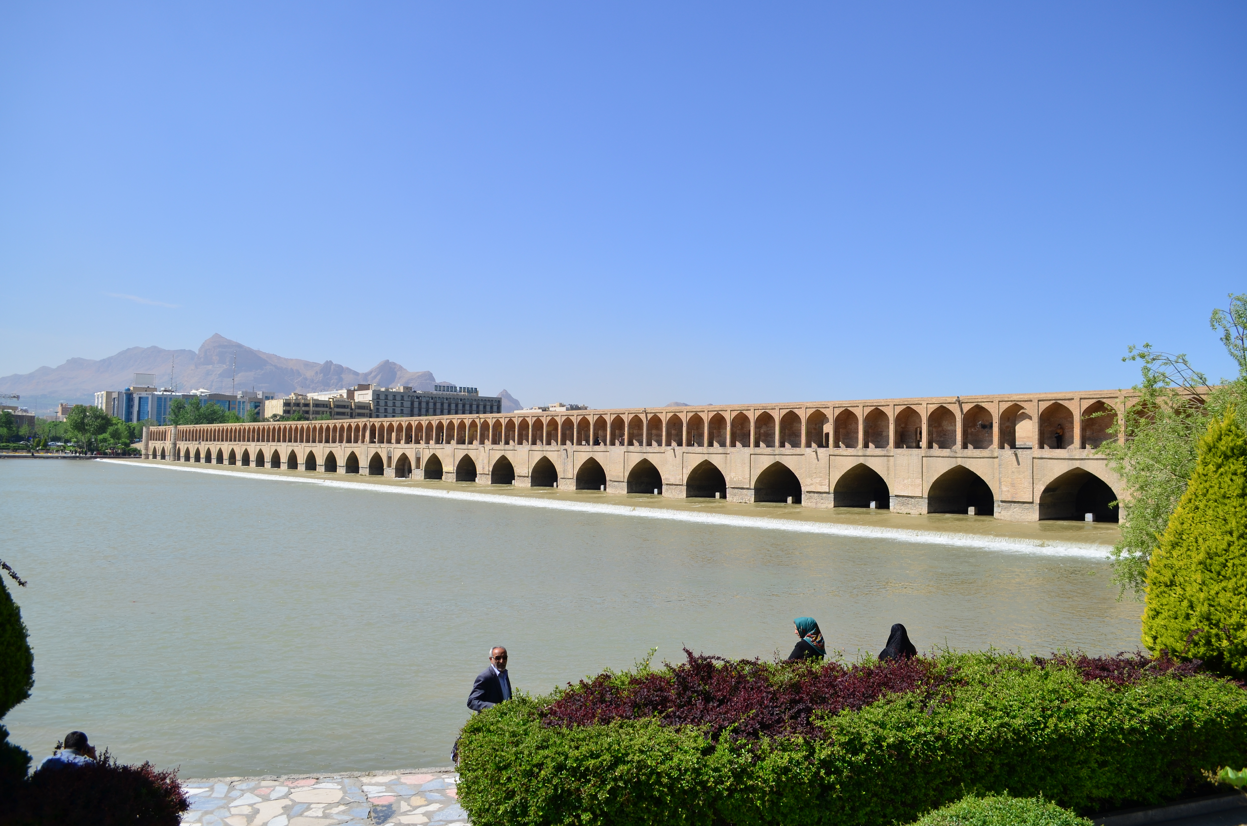 سی و سه پل، اصفهان، ایران